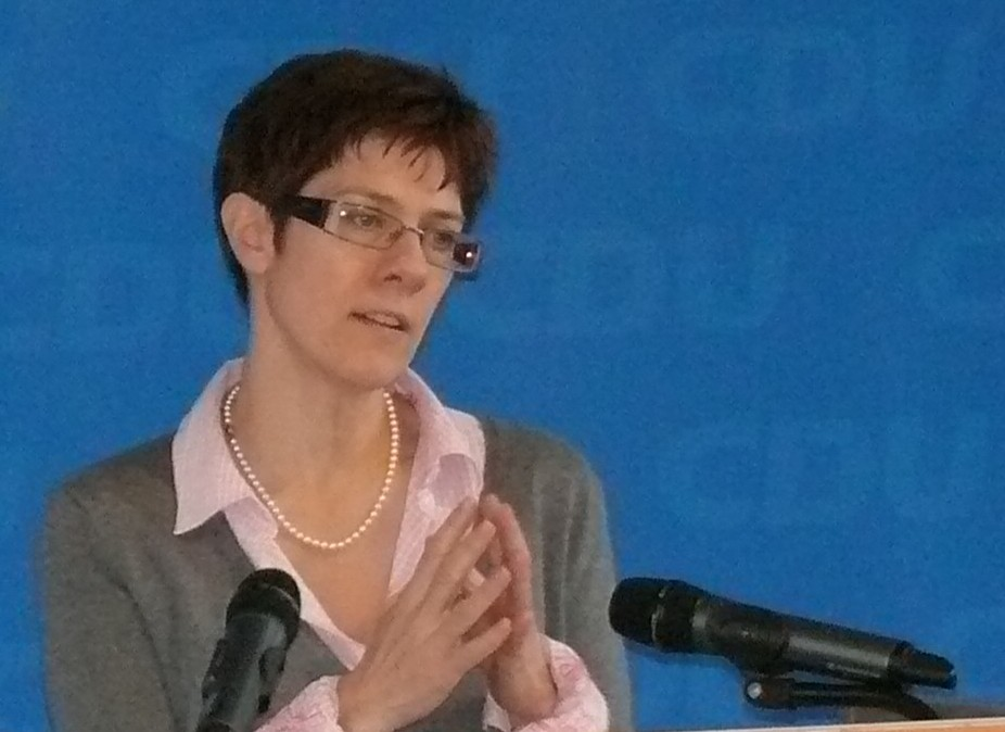 Die Landesvorsitzende der CDU Saar, Annegret Kramp-Karrenbauer, bei einer Veranstaltung in Illingen / Saarland im Jahr 2010